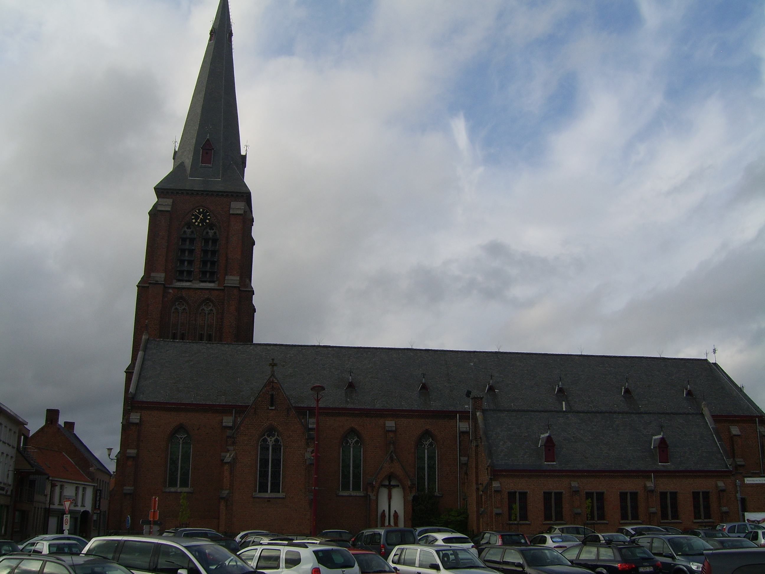 Sint-Amanduskerk te Meulebeke